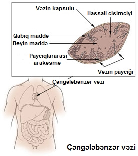 Çəngələbənzər vəzi ya timus - lat. thymus 15 yaşınadək uşaqlarda olur; sonra reduksiya edərək piy toxuması ilə əvəz olunur, odur ki, uşaqlıq dövrü vəzilərindən hesab olunur. Endokrin sisteminin bronxiogen vəzilərdəndir.